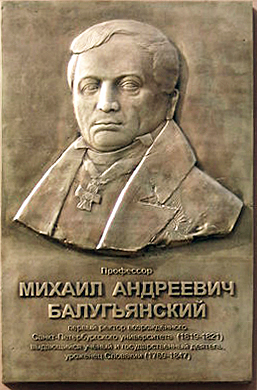 Odhalená tabuľa na budove Petrohradskej univerzity kde pôsobil Rusín Michal Baluďanský